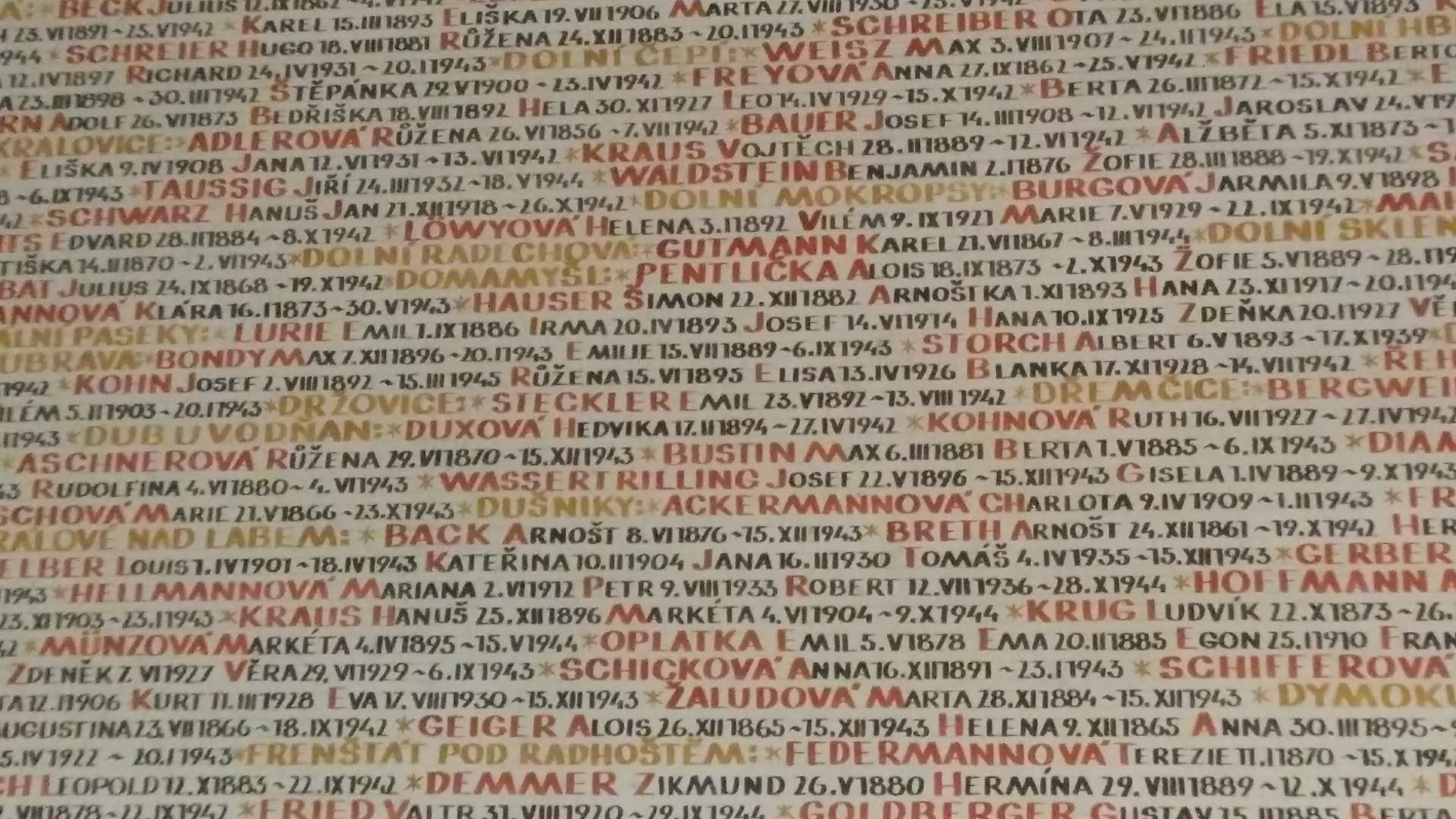 Údaje o Charlottě Ackermannové na stěně Pinkasovy synagogy v Praze